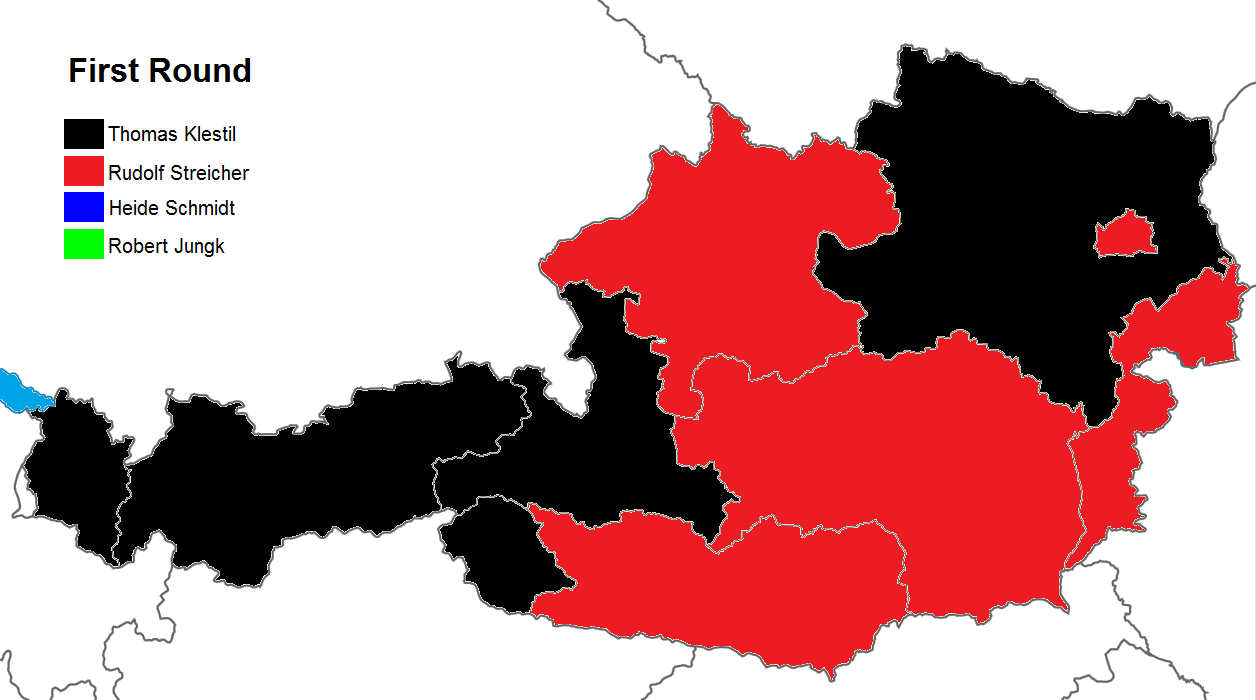 Austrian presidential election results by state, 1. round, 1992